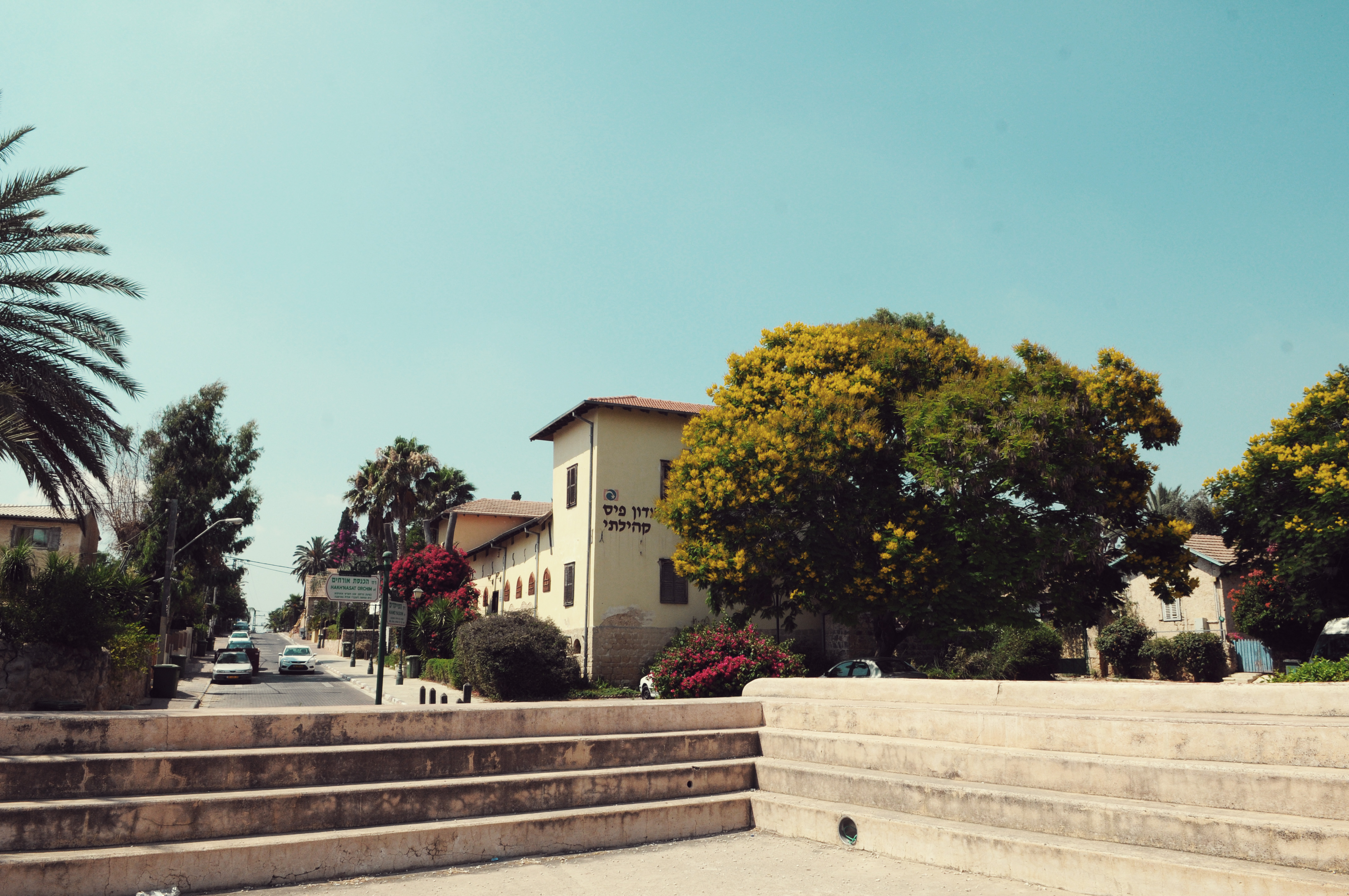 מבט אל בית משק הברון מבריכת הבאר במזכרת בתיה